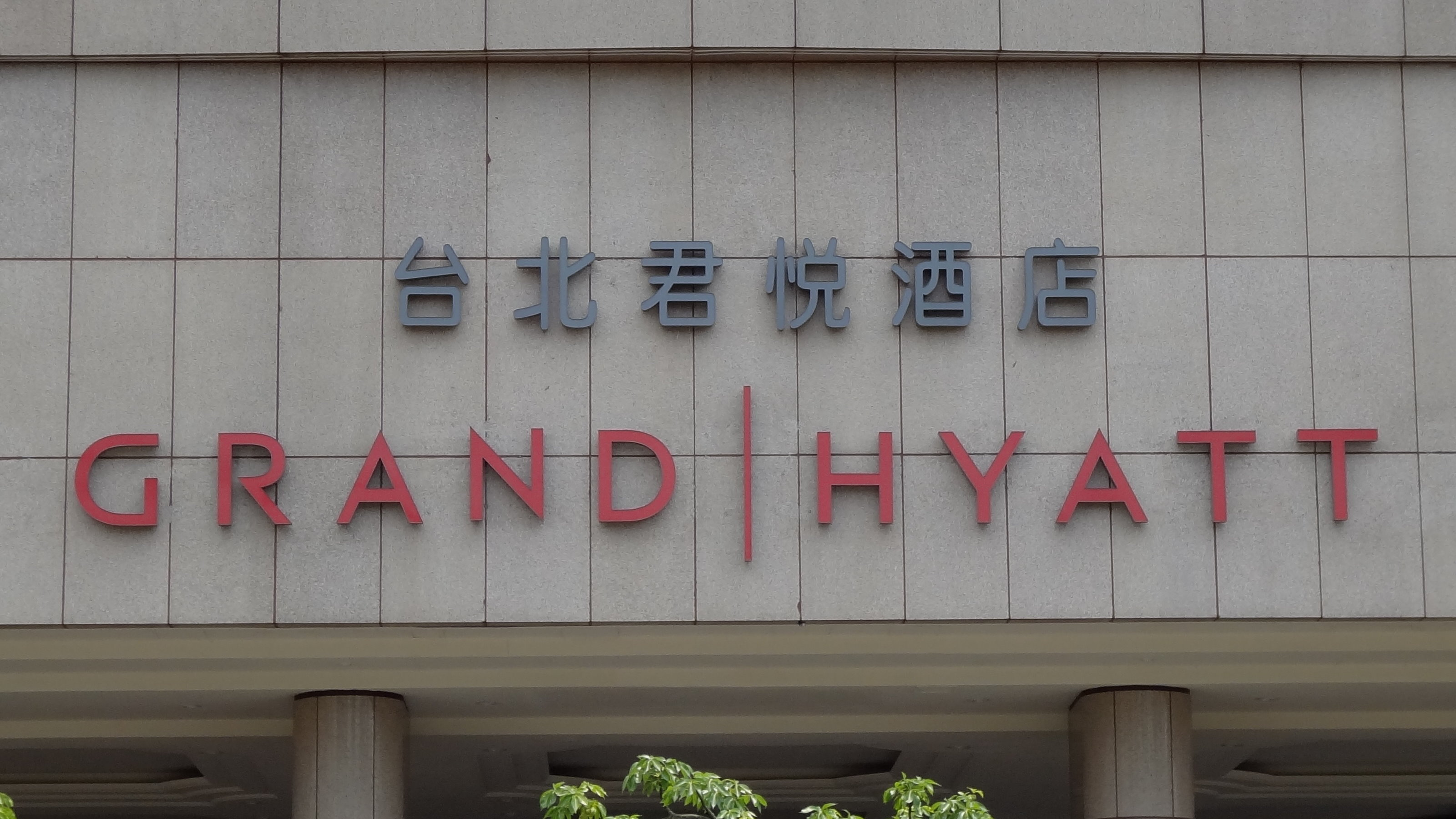 台北君悅酒店大門正上方的文字商標燈箱。